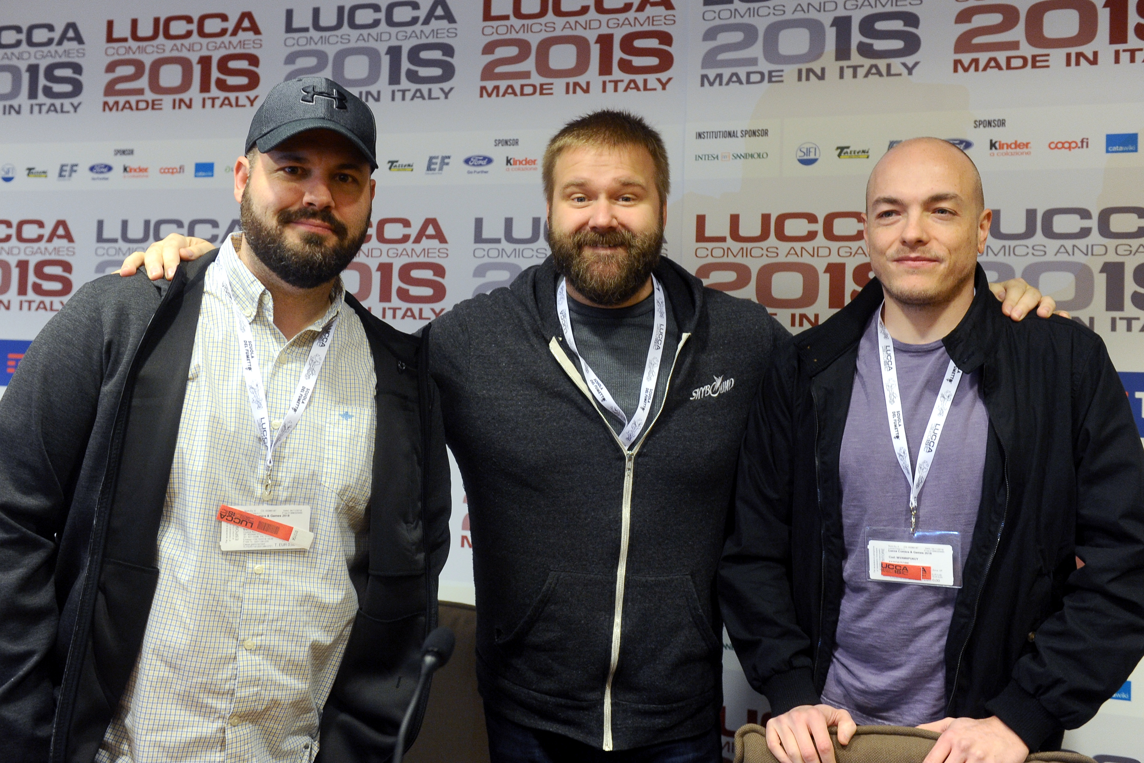 Ryan Ottley, Robert Kirkman e Cory Walker a Lucca Comics & Games 2018. Conferenza stampa in Camera di Commercio.